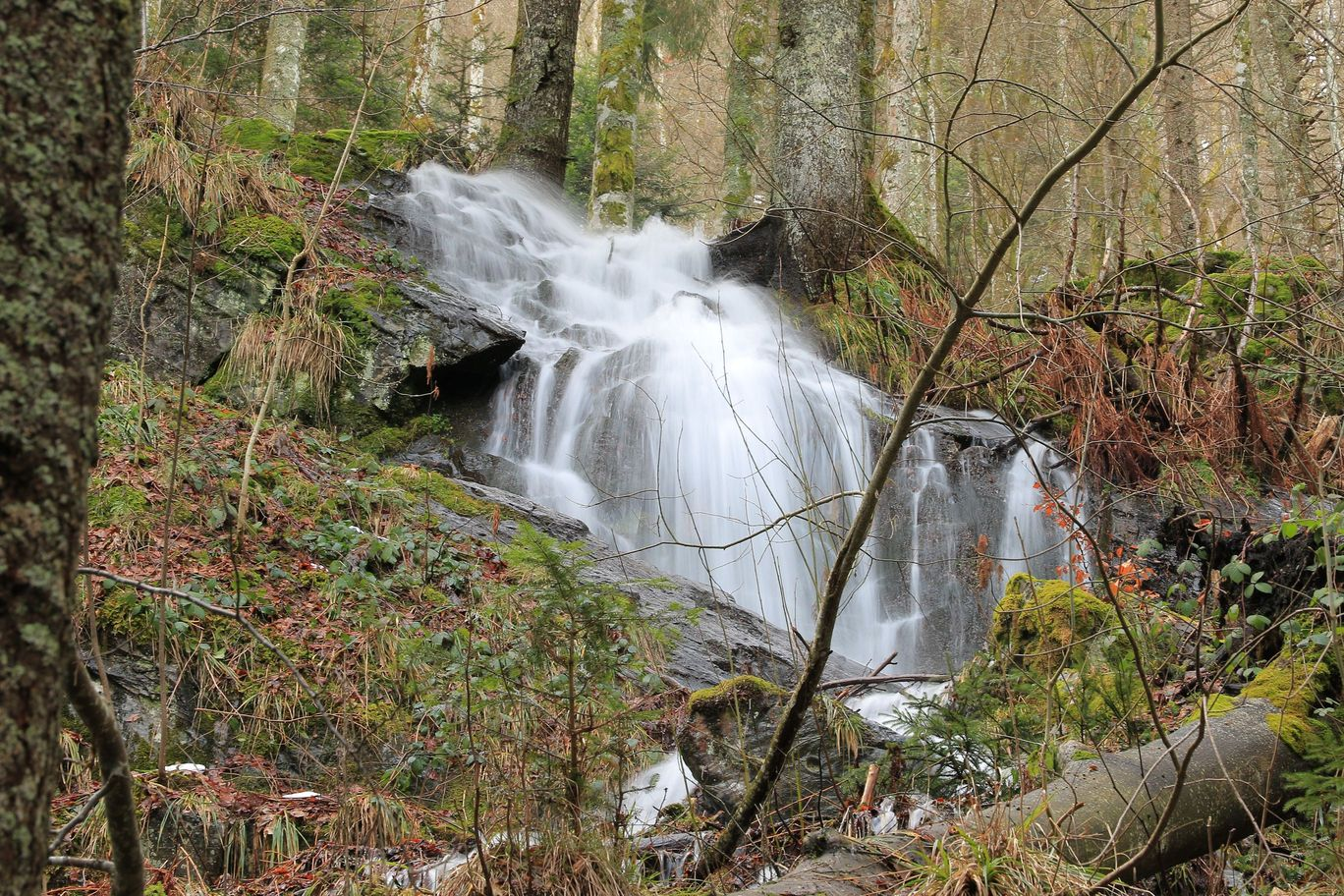 Cascade prise en Janvier.